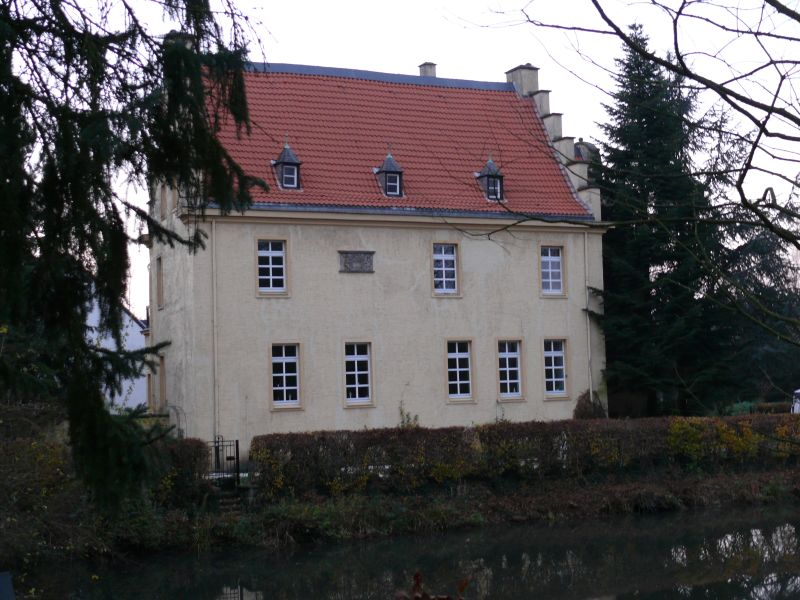 Haus Reck, Hamm